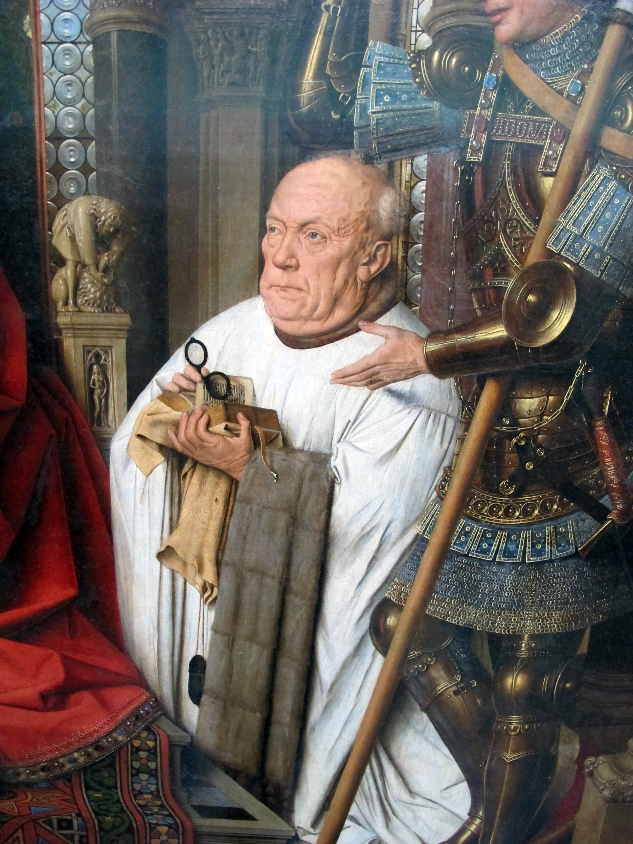 Jan van eyck, madonna del canonico van der paele, 1436